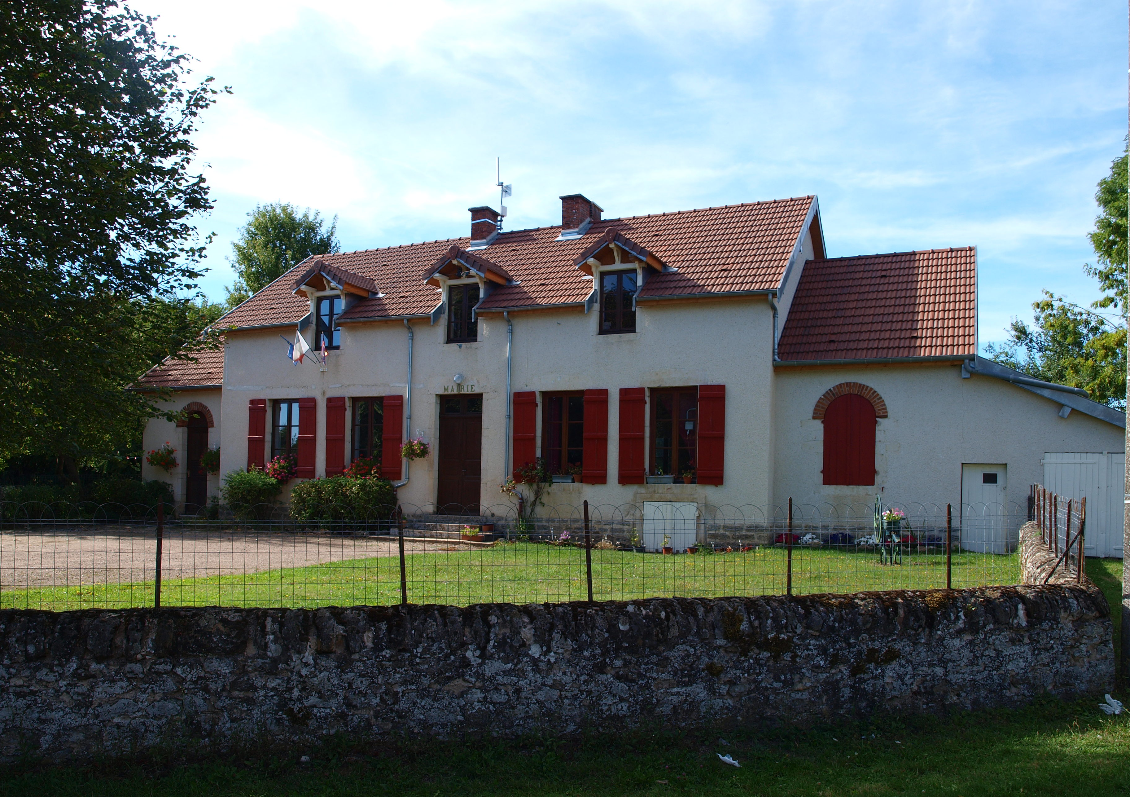 Le Fête (Côte-d'Or, France) ; mairie